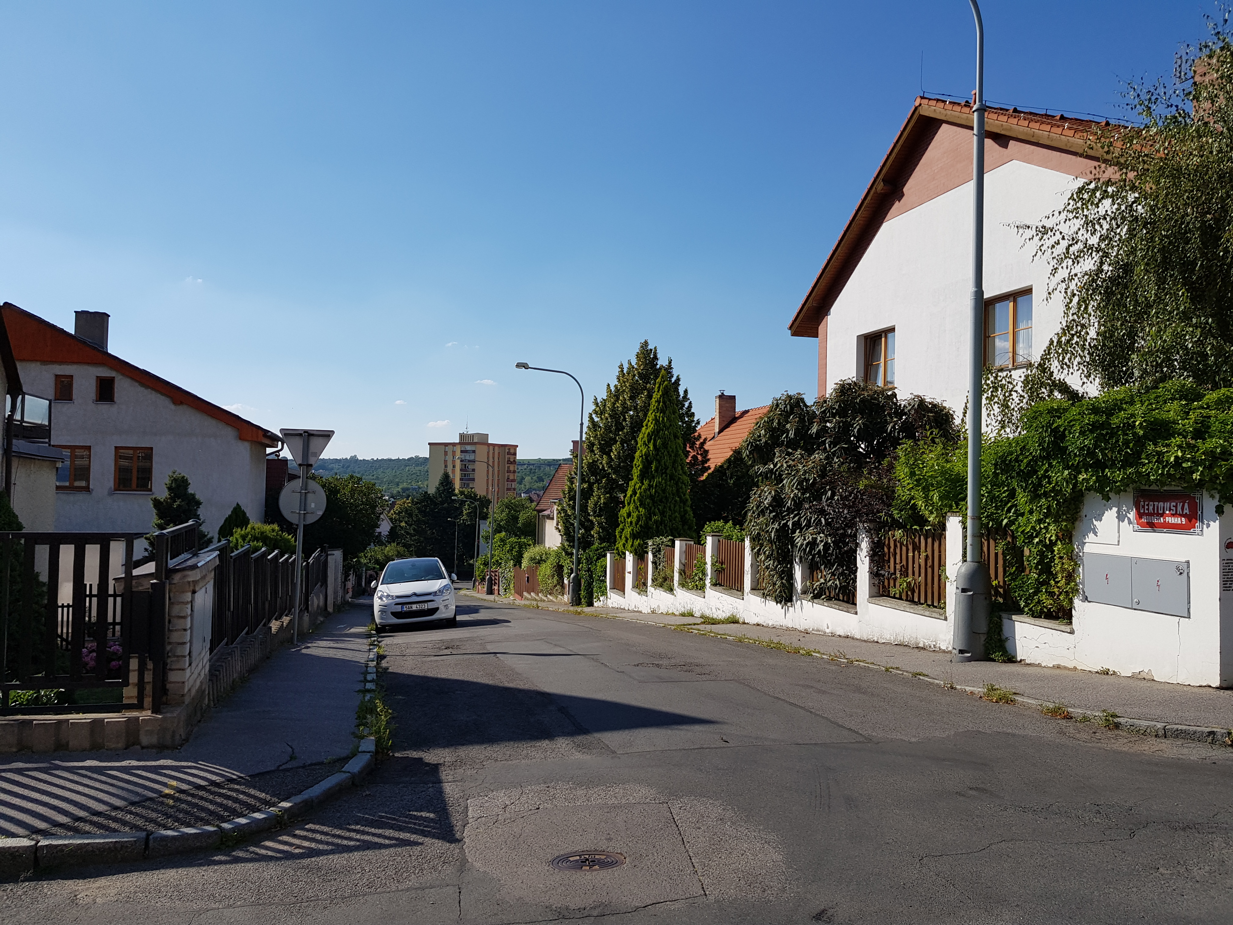 Čertouská ulice, Praha 14-Hloubětín, pohled od ulice Vaňkova směrem na sever